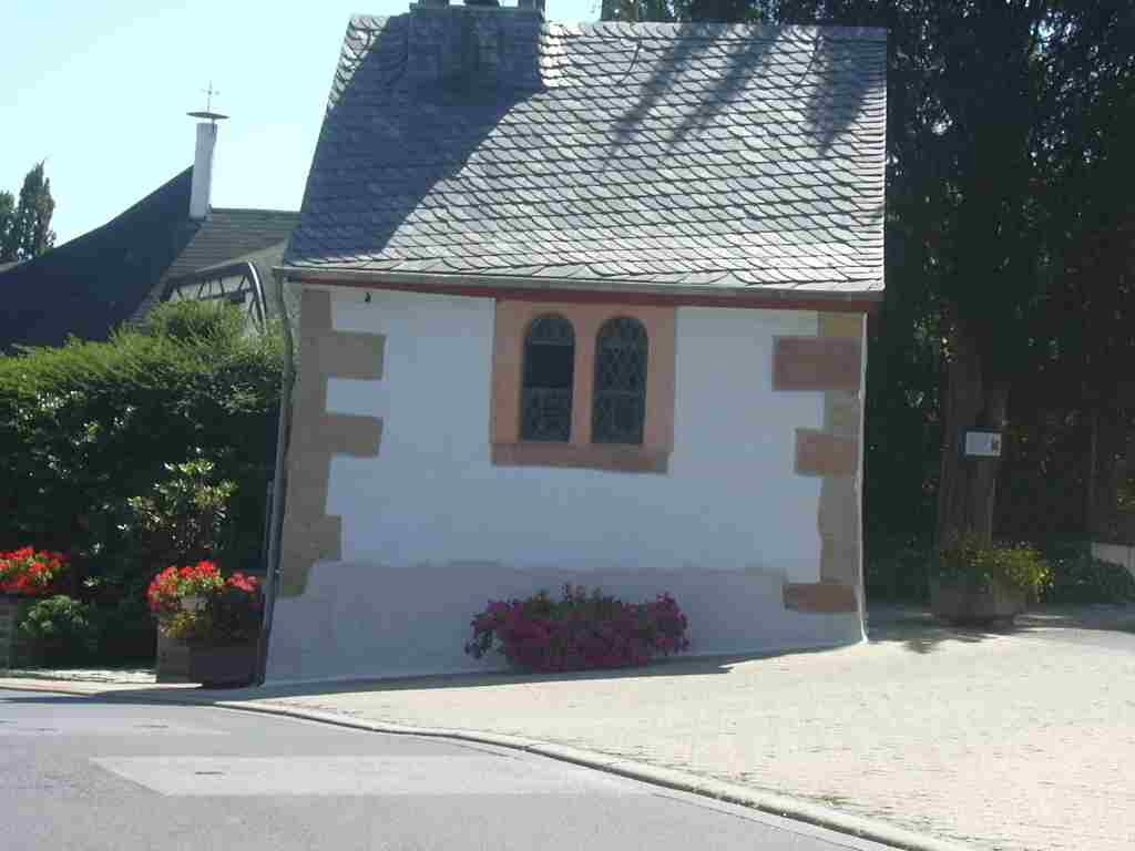 Kapelle in Berzbuir bei Düren Own Work papa1234 Date: 2006-07-14